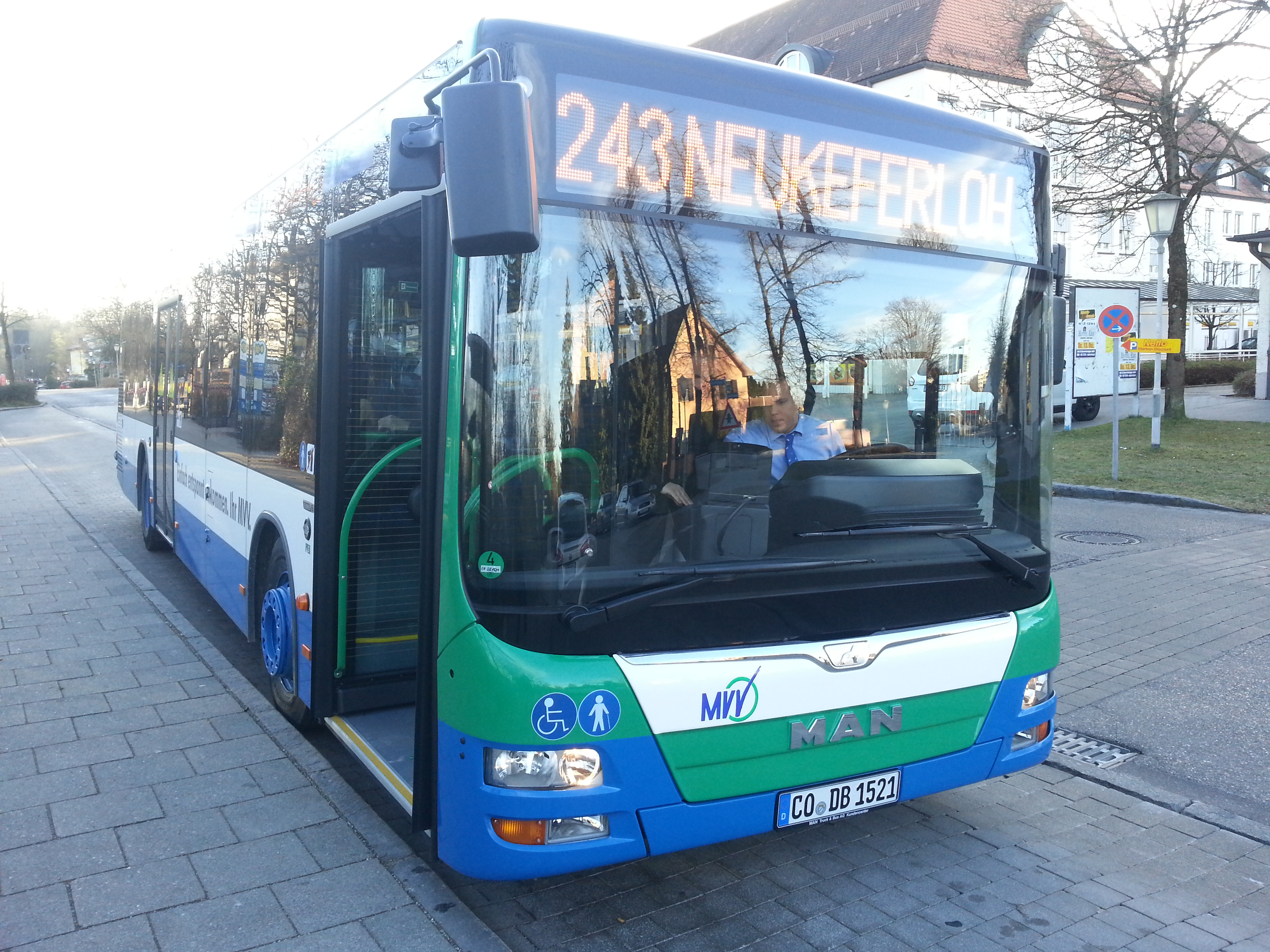 DRB-Bus im MVV